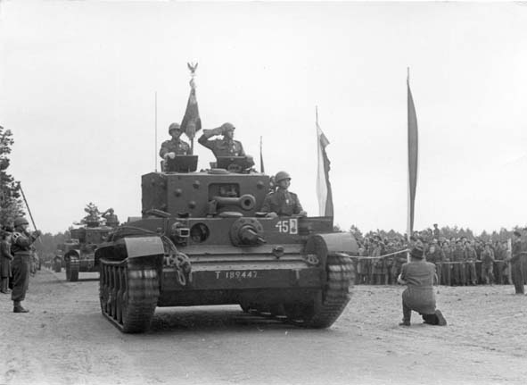 Powojenny Maczków